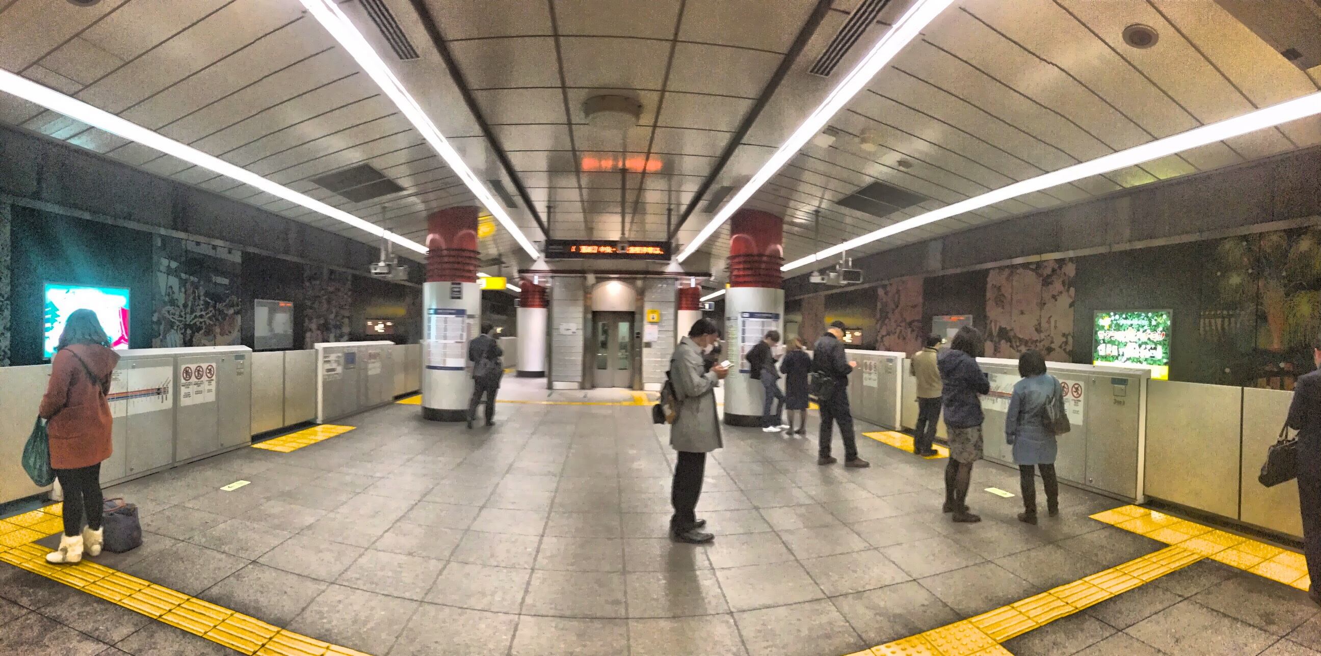 TX線、浅草駅のホーム (TX Line, Asakusa Station platforms)